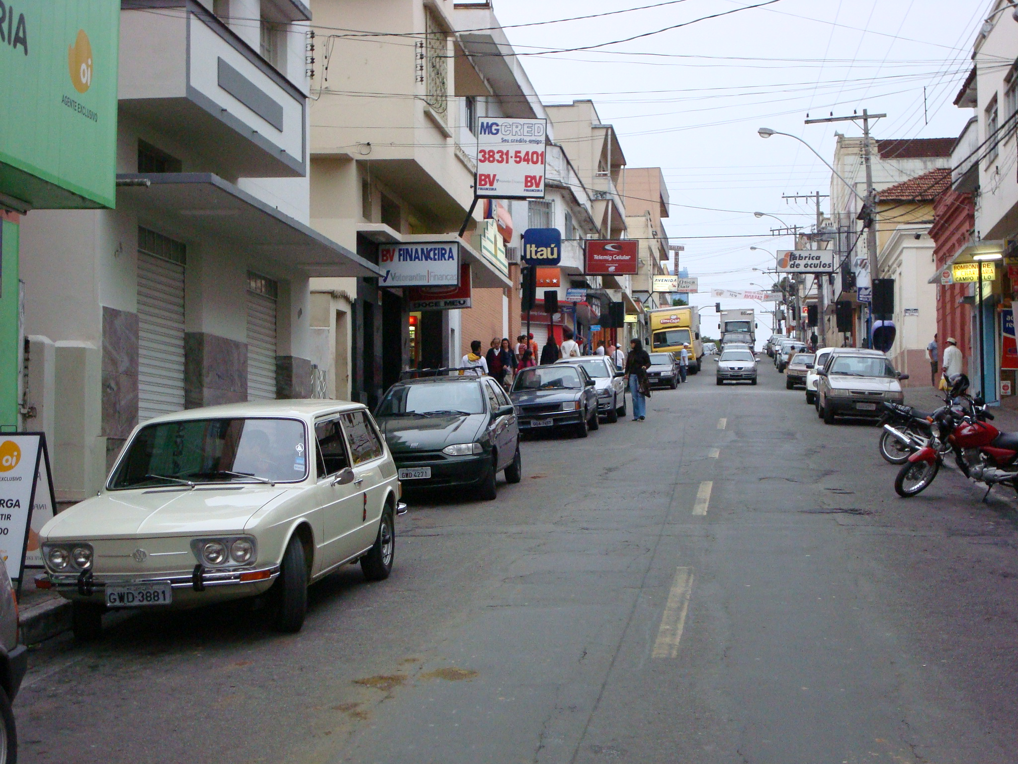 Avenida Afonso Pena em Campo Belo